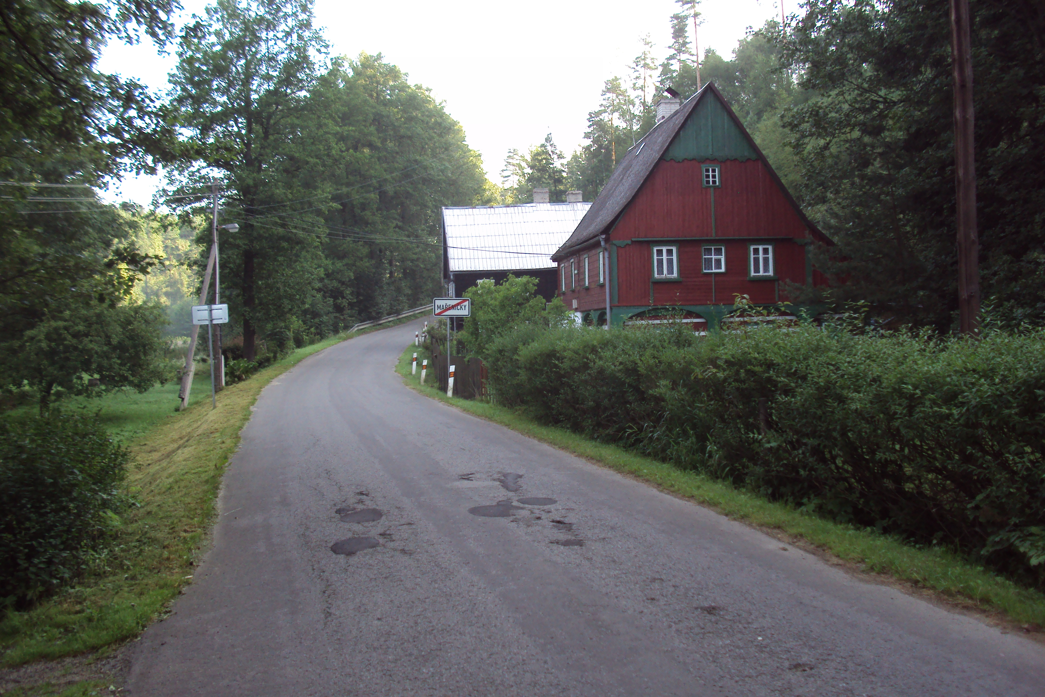 Severní konec vesničky Mařeničky